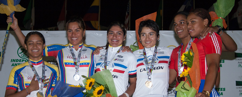 El podio de la velocidad por equipos femenina Campeonato Panamericano de Ciclismo de Pista, Medellín. 2 de mayo de 2011.